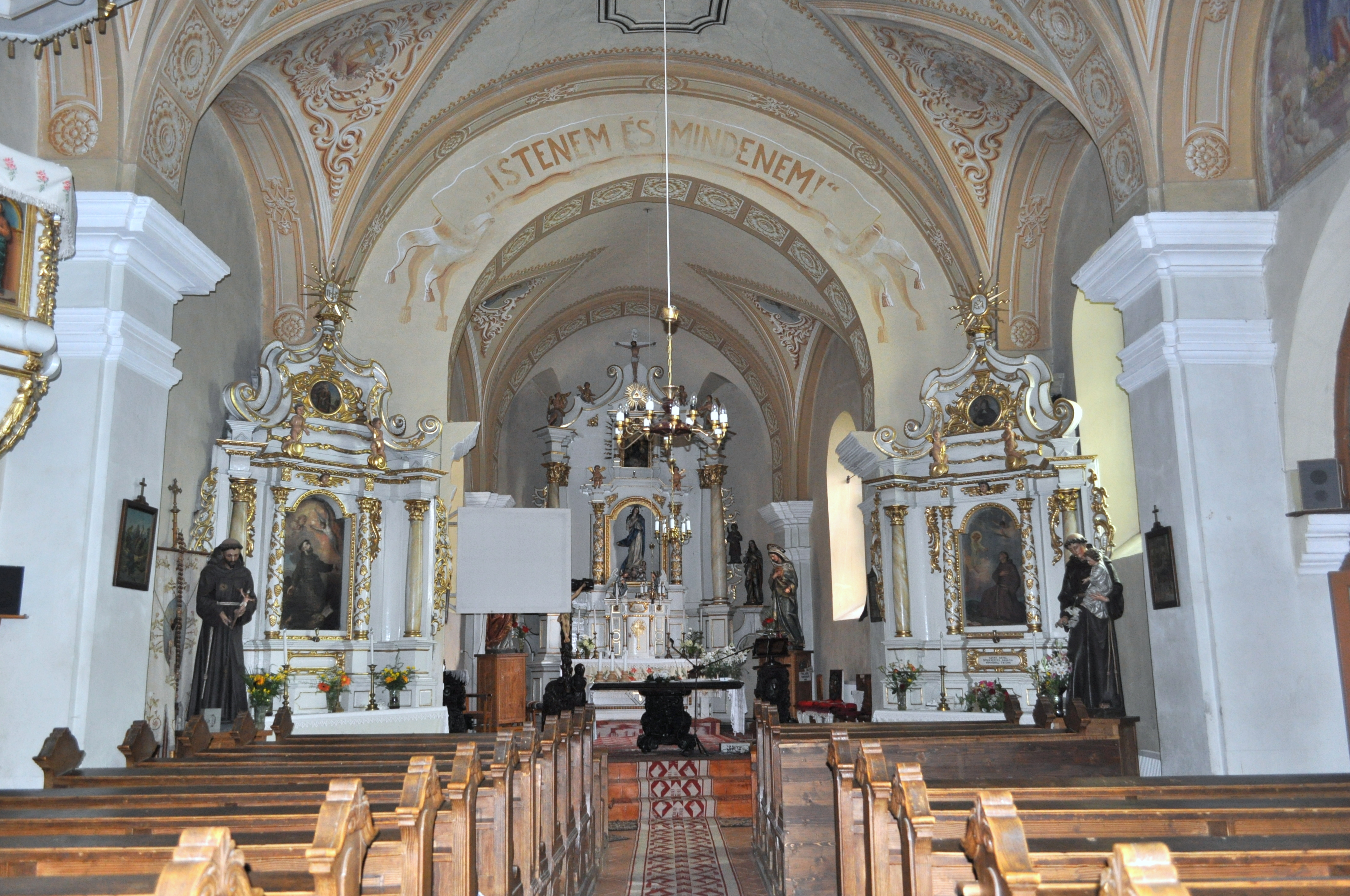 Lăzarea, județul Harghita 01